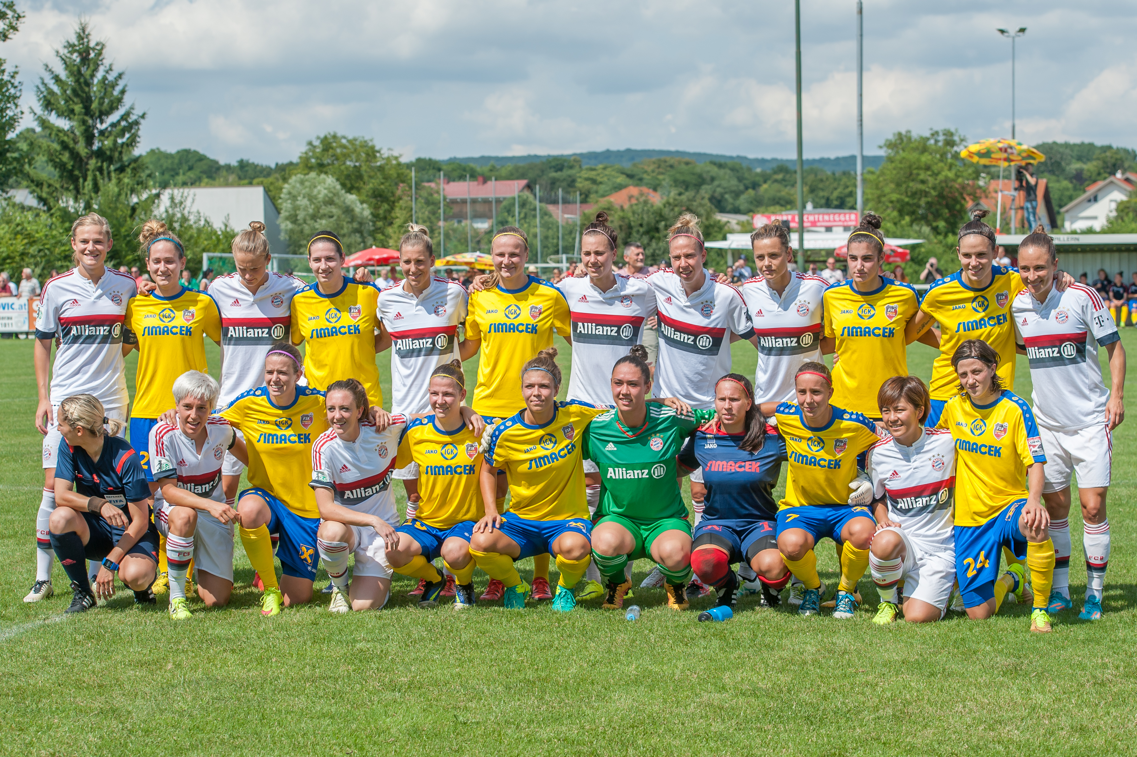 Testspiel SKN St. Pölten vs FC Bayern München am 23. Juli 2016 in Spillern. Bild zeigt die Frauenmannschaften von FC Bayern München und SKN St. Pölen.